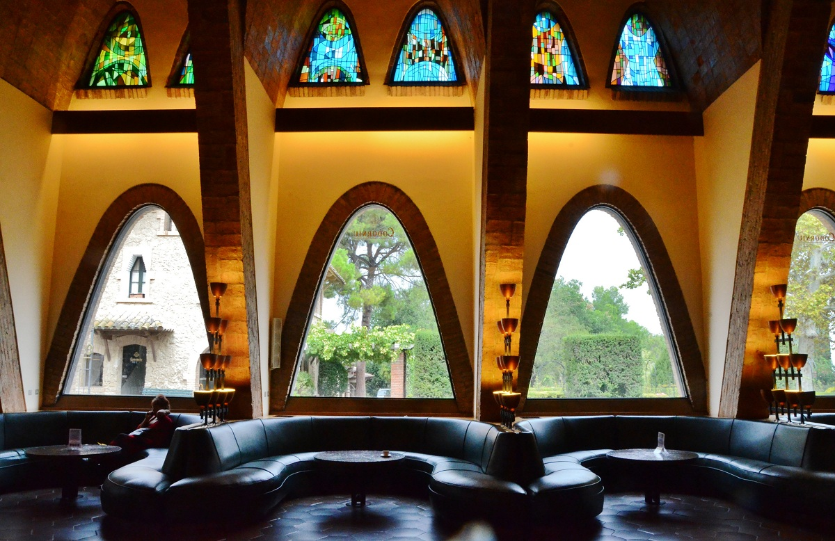 Caves Codorniu (Sant Sadurní d'Anoia)